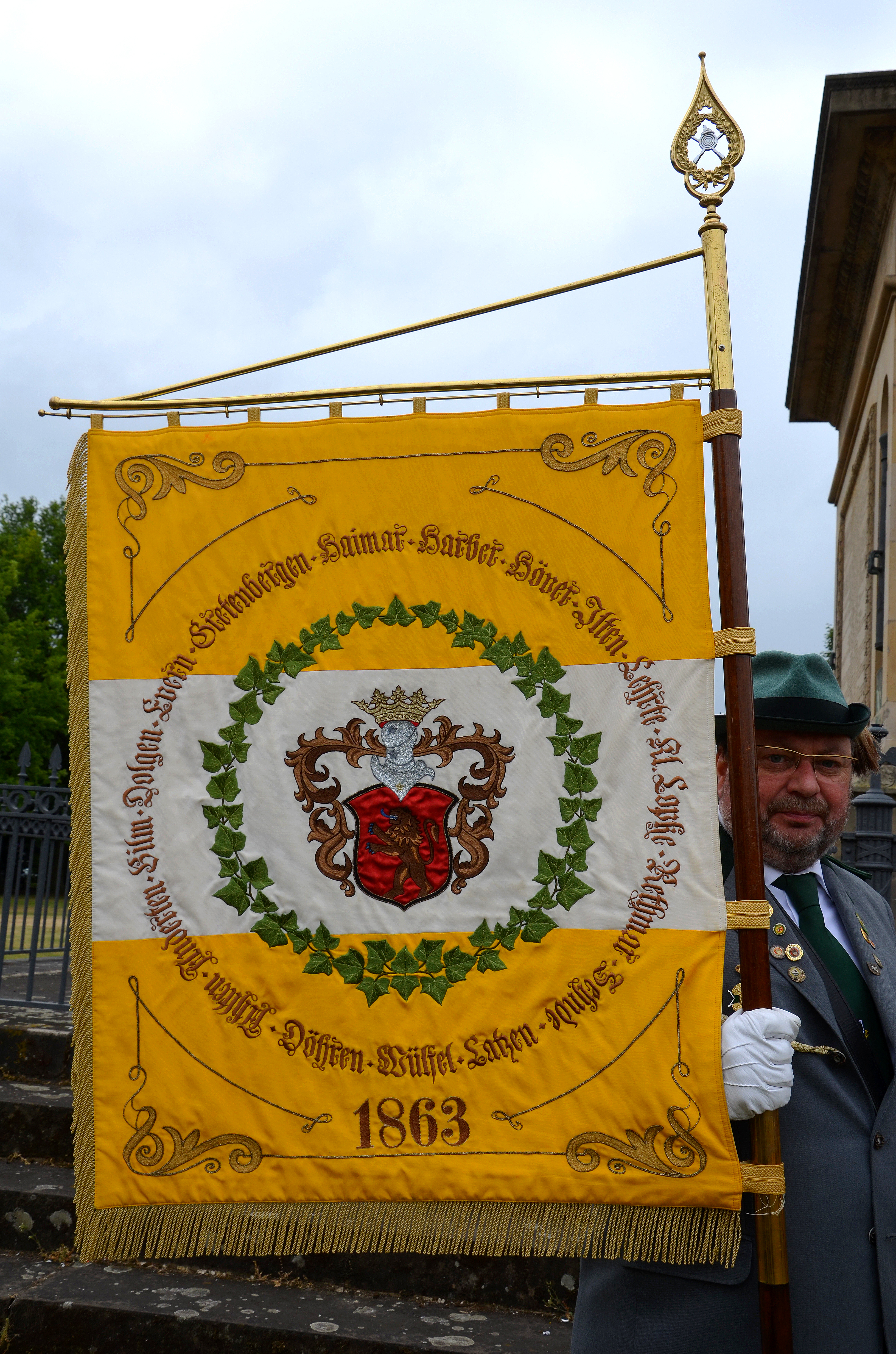 Zur 200sten Wiederkehr der Schlacht bei Waterloo (18. Juni 1815) hatte der Welfenbund e.V. gemeinsam mit Royal British Legion Hannover Branch e.V. zu einer Gedenkveranstaltung am 20. Juni 2015 an der Waterloosäule auf dem Waterlooplatz in Hannover geladen. An der Feierlichkeit mit Kranzniederlegung und musikalischer Umrahmung nahmen unter anderem auch Vertreter der Royal Scots Dragoon Guards teil, ferner die Schützenbruderschaft Das große Freie, die Freiwillige Feuerwehr Barfelde, Spielleute vom Musikzug der Freiwilligen Feuerwehr Bethel und Rheden sowie Vertreter der Loge Wilhelm zur Deutschen Treue ...